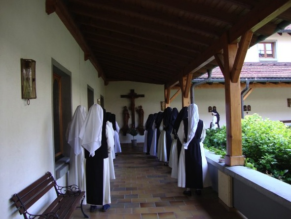 Statio